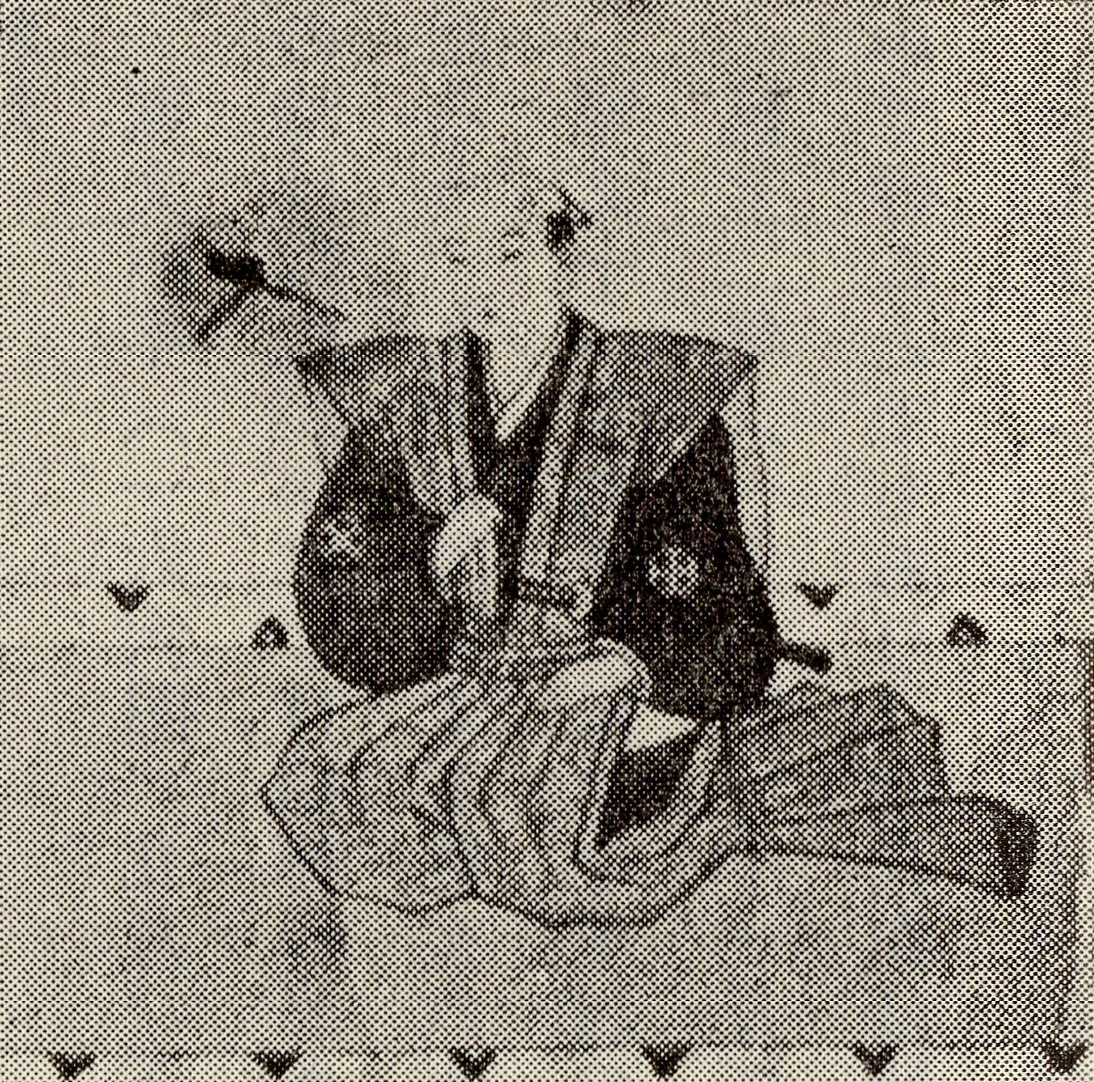 中川久通の肖像(モノクロ)。